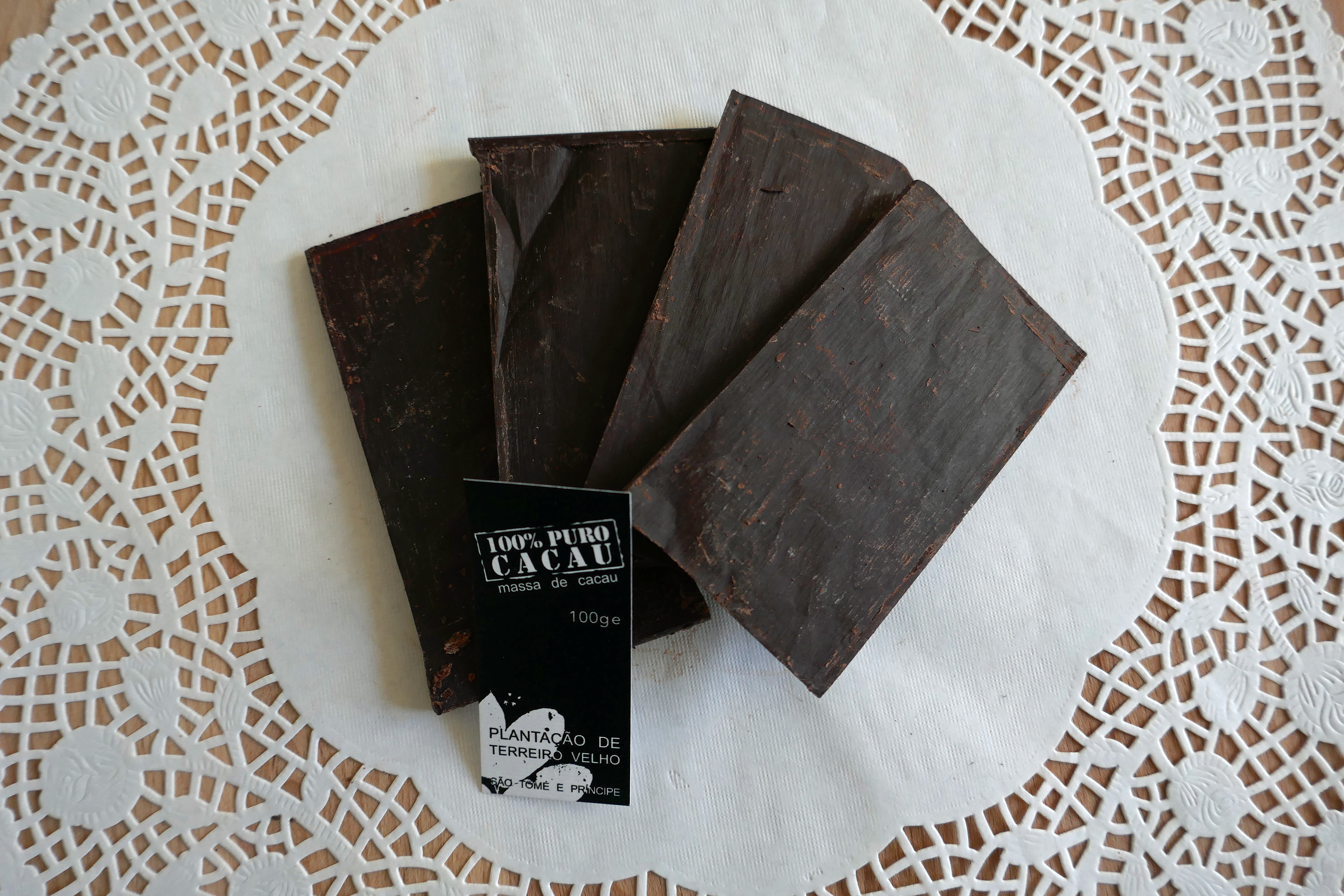 Chocolat 100% cacao, en provenance de Terreiro Velho, sur l'île de Principe, à Sao Tomé-et-Principe.